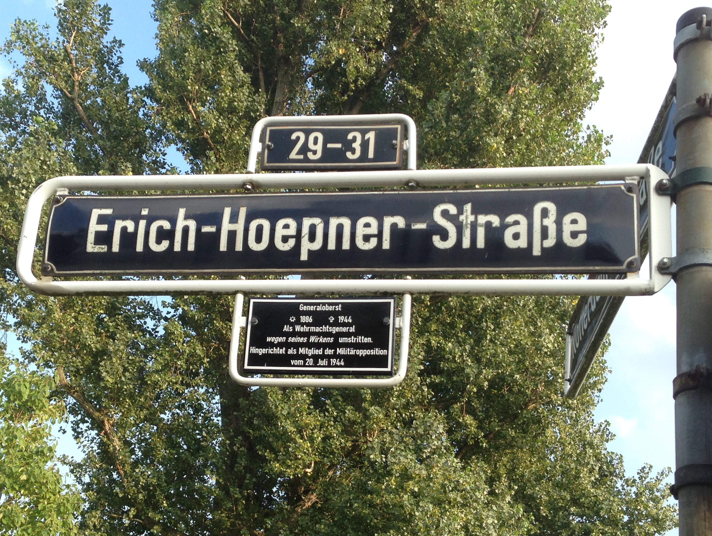 Straßenschild Erich-Hoepner-Straße 29–31, Düsseldorf-Goldheim